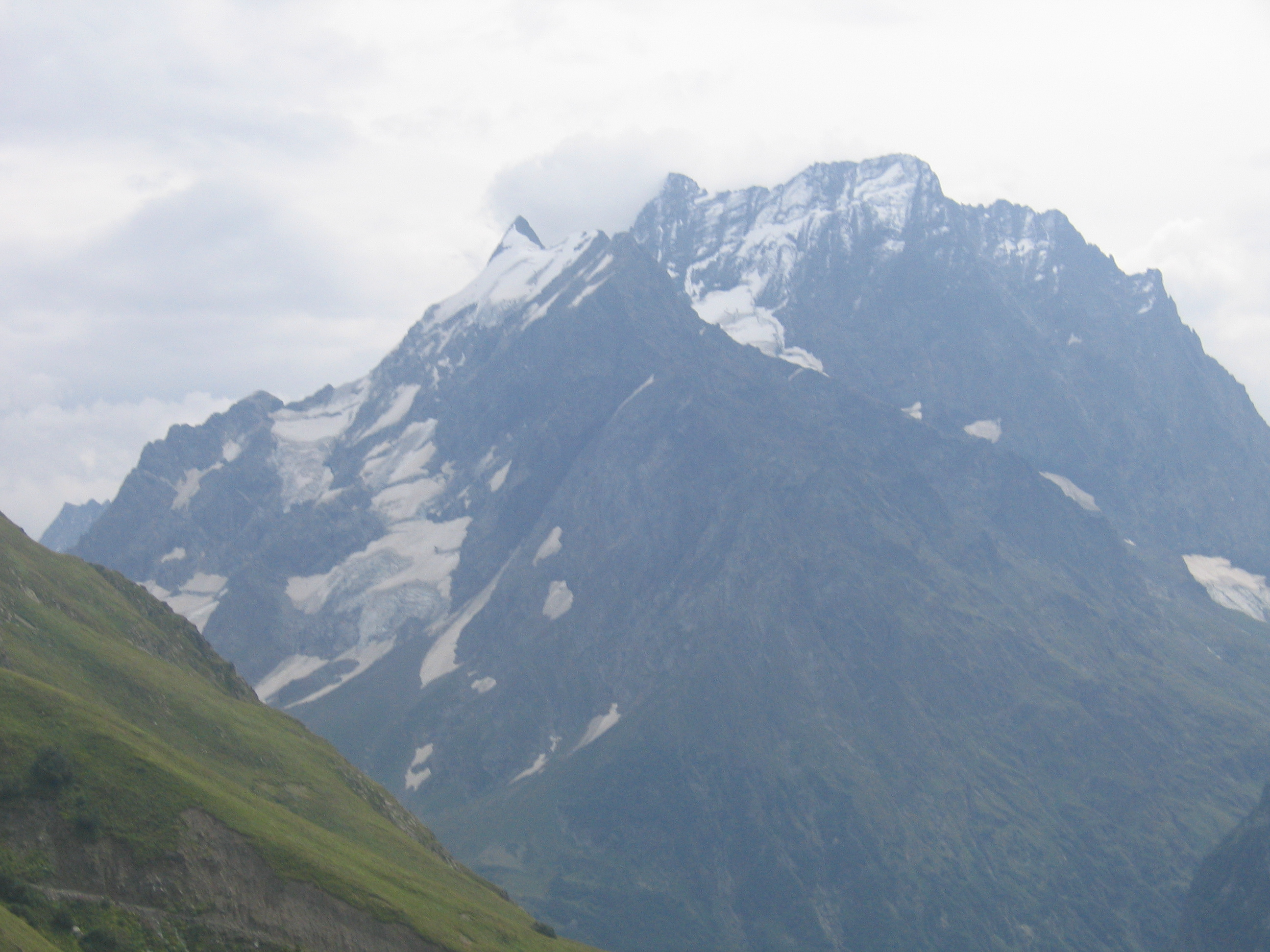 гора Домбай-Ульген